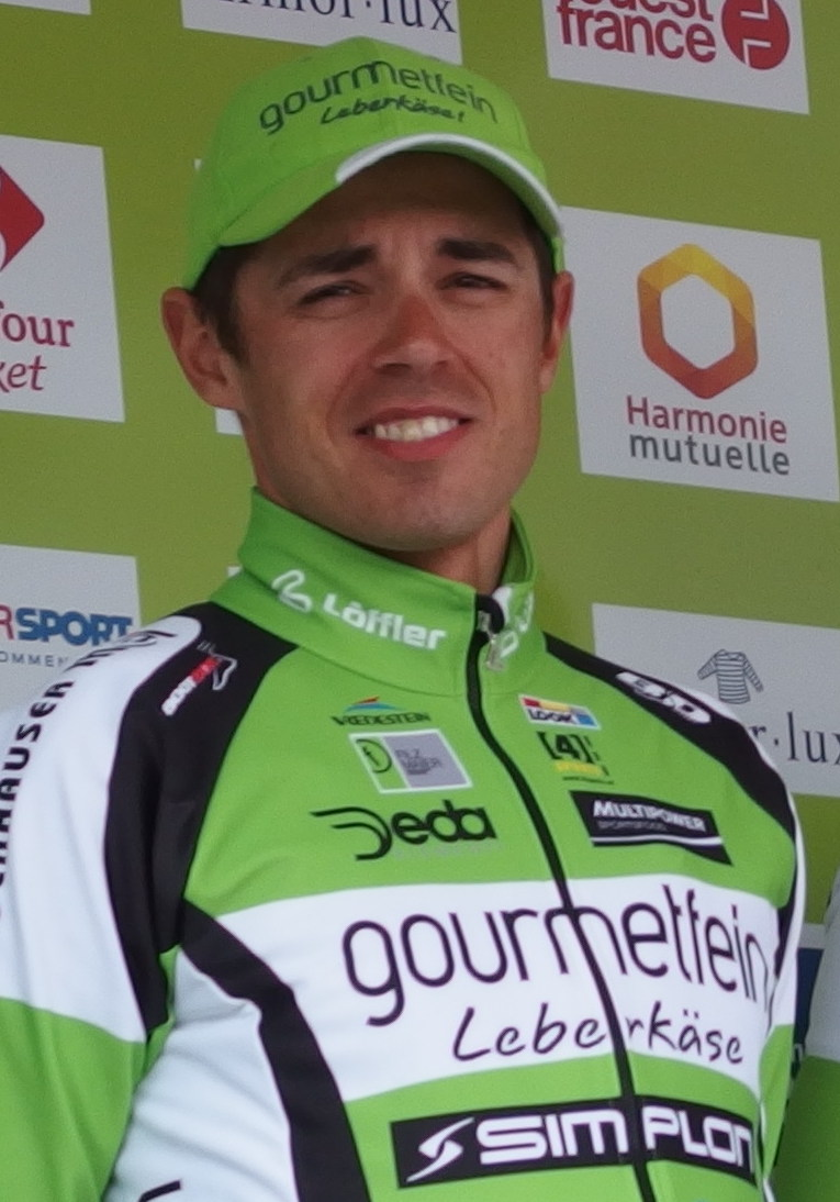 Tour de Bretagne 2014 - Présentation des équipes au départ de la sixième étape à Radenac - Équipe Gourmetfein Simplon Wels Depicted person: Matej Marin